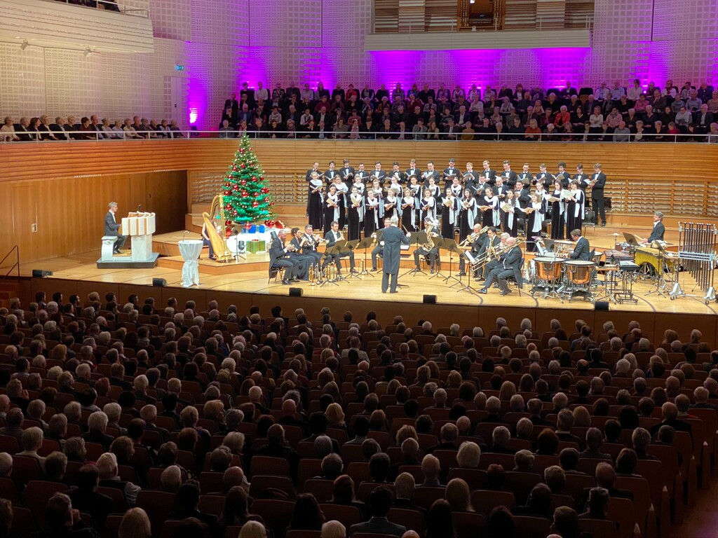 Weihnachtskonzert "Christmas in Lucerne" mit Classic Festival Brass und dem Moskauer Kathedralchor unter der Leitung von Manfred Obrecht im KKL Luzern.